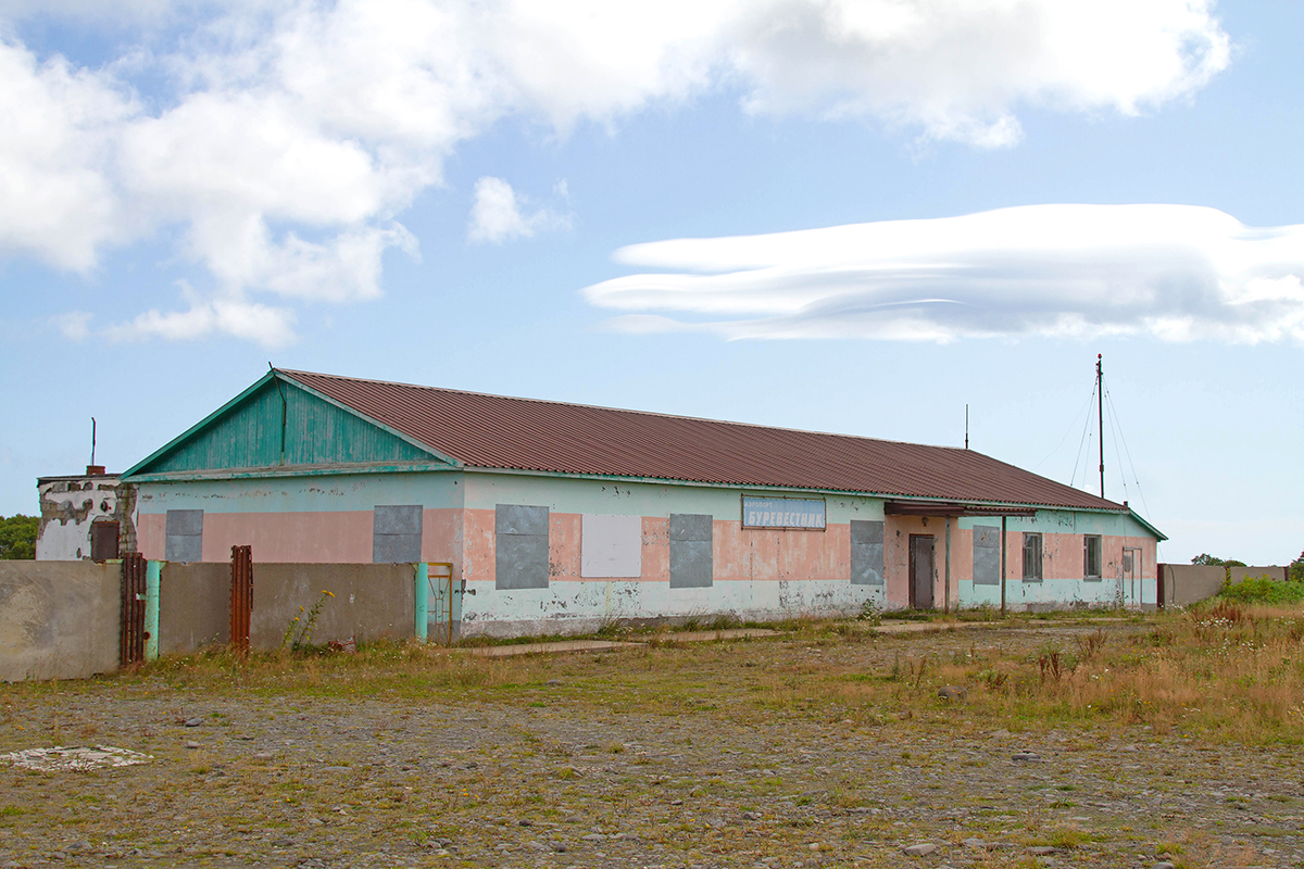 Аэропорт "Буревестник", действующий, военный